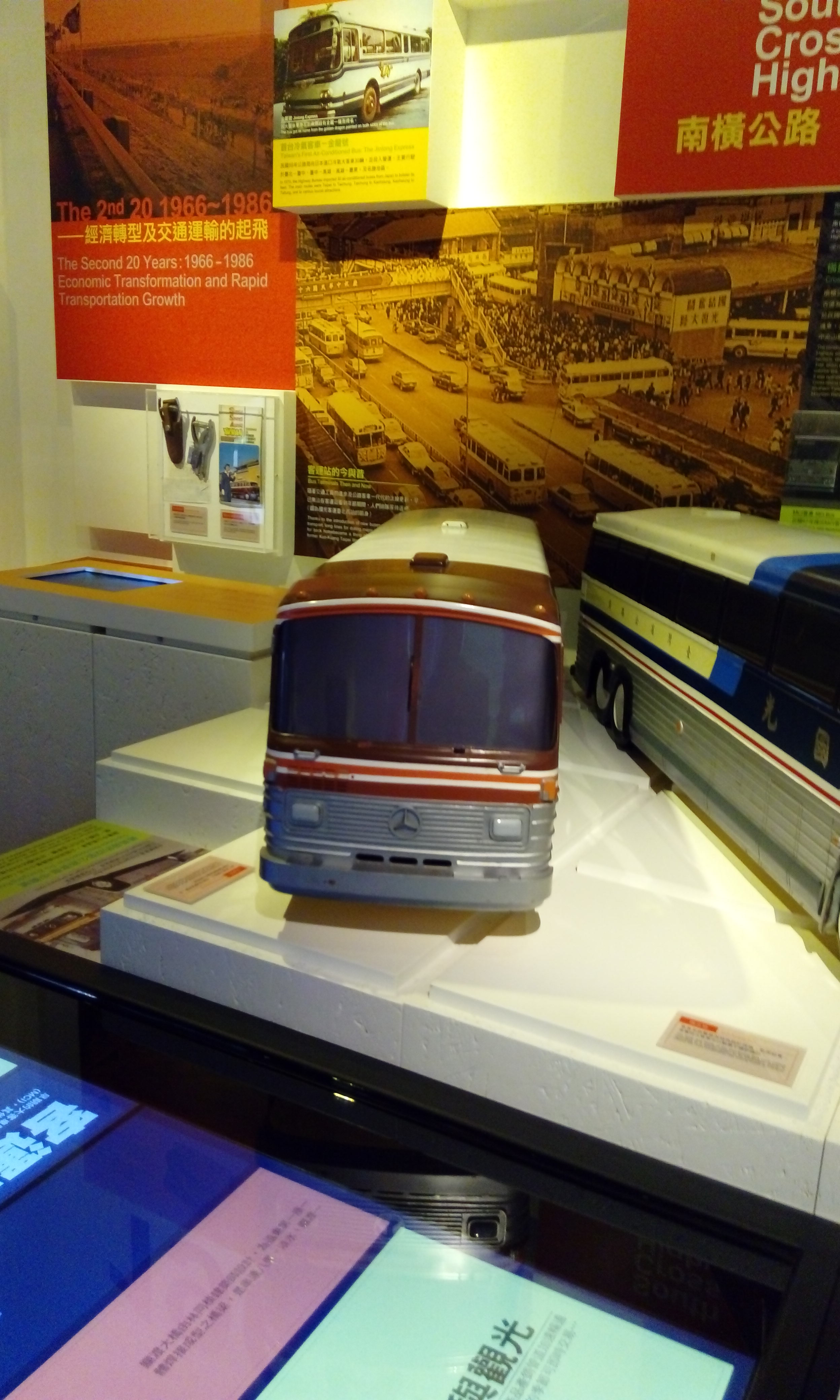 台汽客運BENZ OF1417中興號客車模型，於台灣公路博物館